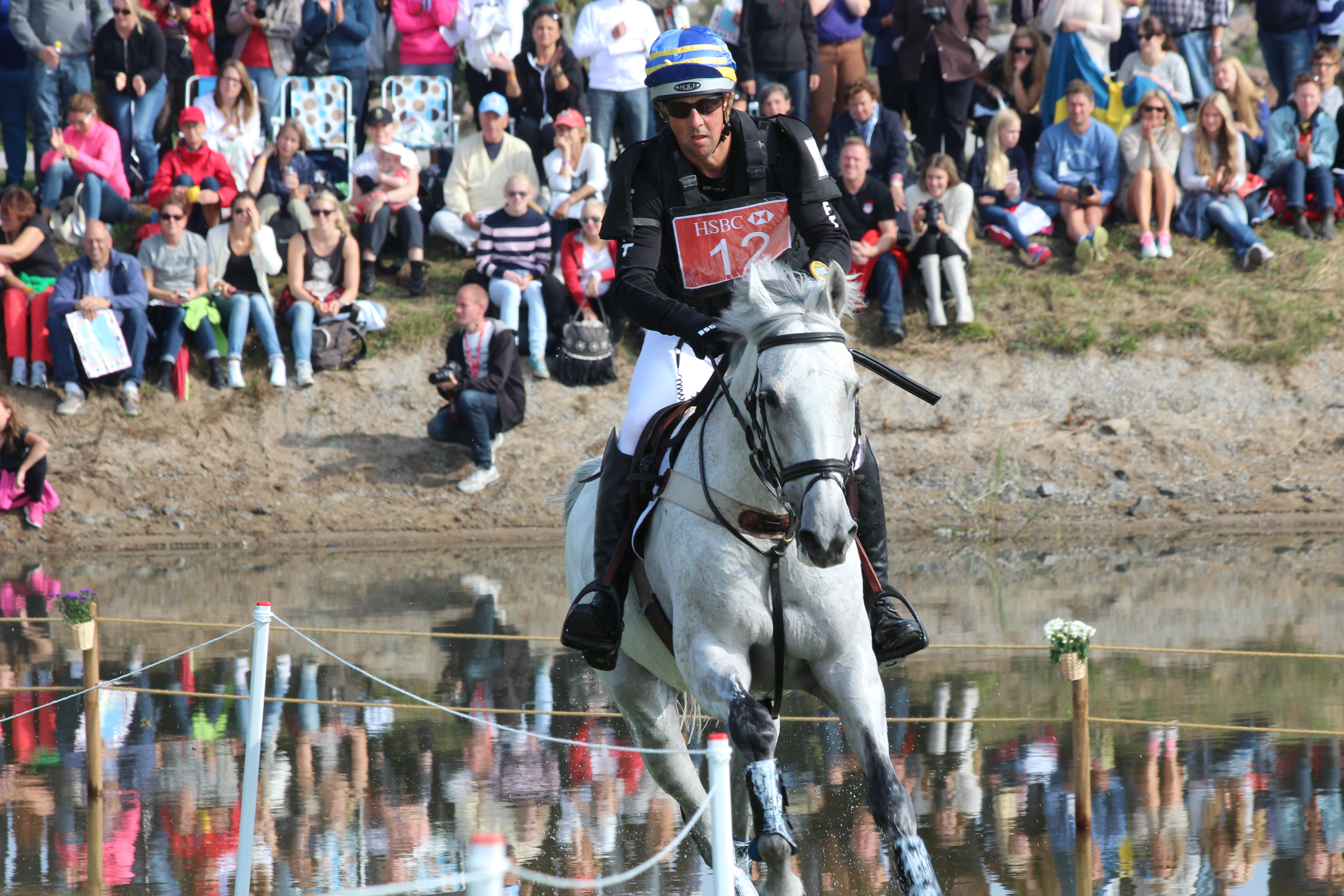 Dag Albert och Tubber Rebel vid vattenhindret på Ribersborg i Malmö under EM 2013.